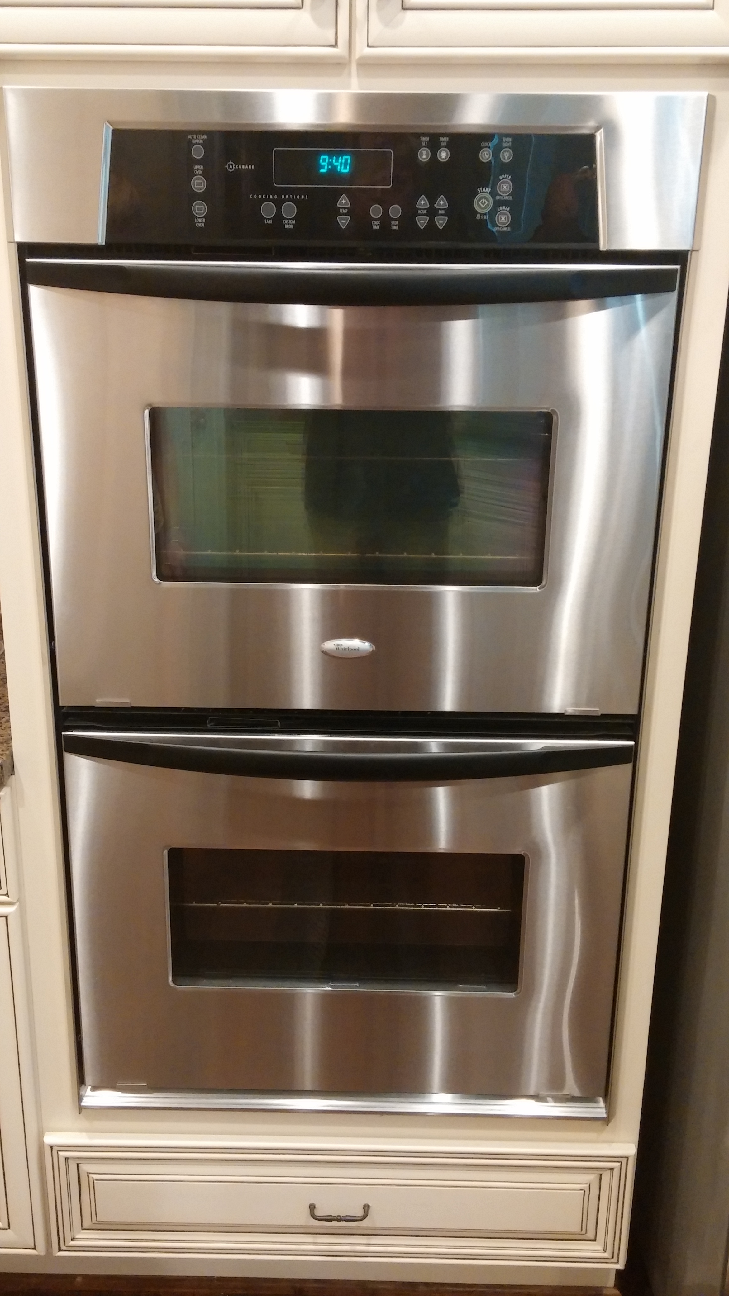 A double oven